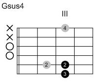 Eigenanfertigung